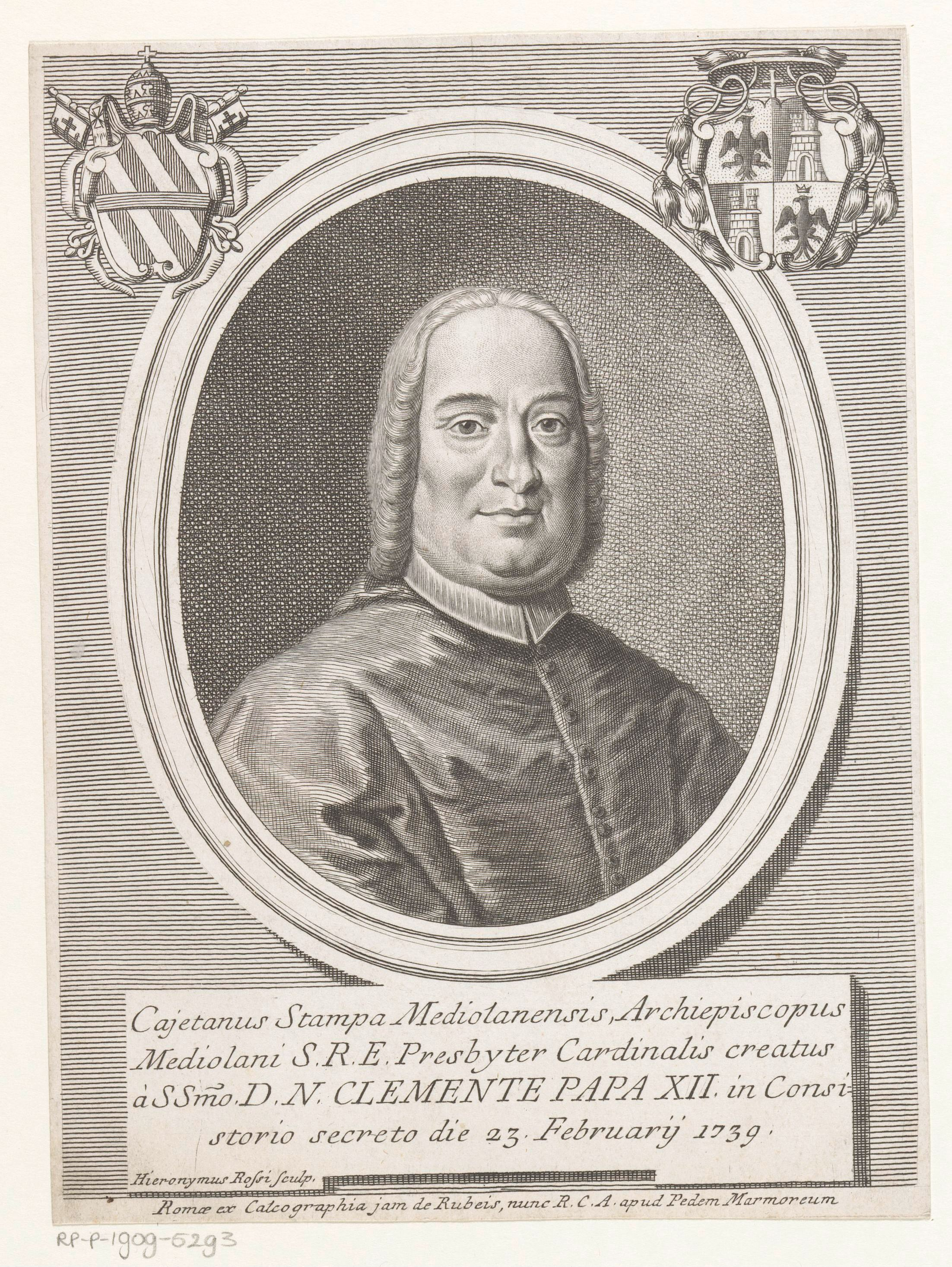 IdentificatieTitel(s): Portret van kardinaal Gaetano StampaObjecttype: prent Objectnummer: RP-P-1909-5293Opschriften / Merken: verzamelaarsmerk, verso, gestempeld: Lugt 2228VervaardigingVervaardiger: prentmaker: Girolamo Rossi (II) (vermeld op object)uitgever: Calcographia R.C.A. (vermeld op object)uitgever: Domenico de'Rossi (vermeld op object)verlener van privilege: Pauselijk hof (vermeld op object)Plaats vervaardiging: prentmaker: Romeuitgever: Romeuitgever: Romeverlener van privilege: VaticaanstadDatering: 1739 - 1762Fysieke kenmerken: gravureMateriaal: papier Techniek: graveren (drukprocedé)Afmetingen: blad: h 213 mm (Binnen plaatrand afgesneden.) × b 162 mm (Binnen plaatrand afgesneden.)OnderwerpWat: historical personscardinalWie: Gaetano StampaVerwerving en rechtenVerwerving: aankoop 1905Copyright: Publiek domein